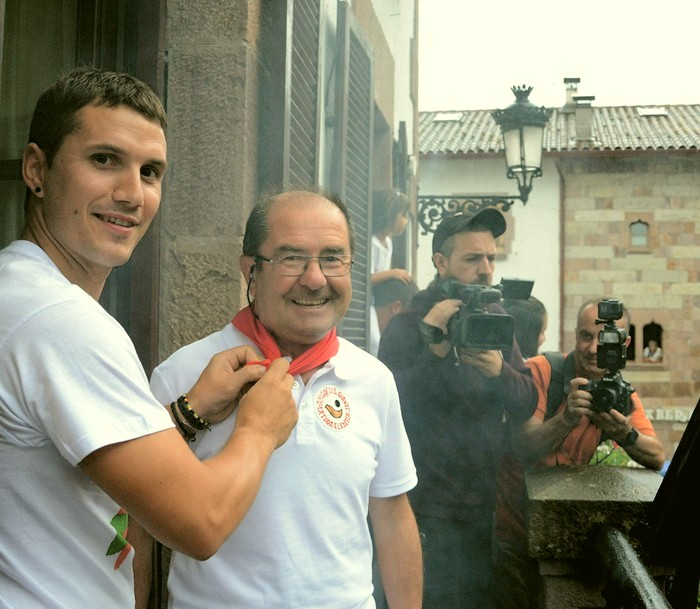 2017ko Doneztebe jaietako txupinazoa. Tiburcio Arraztoa eta Xanti Uterga alkatea.